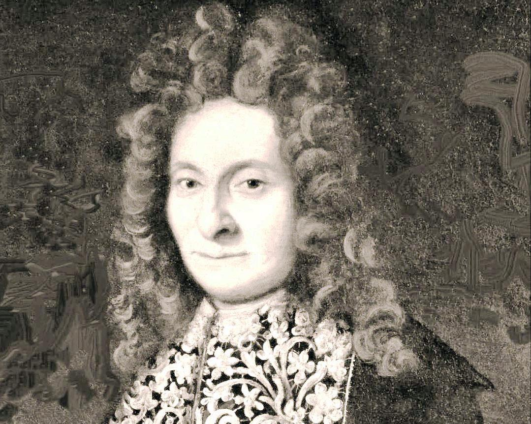 Retrato de Sebastián de Rocafull, KMSKA (Bélgica). Koninklijk museum voor schone kunsten, Antwerpen, fondo Wouters, nº114. Tomado de la obra (en el dominio público) Catalogue descriptif du Musée Royal d'Anvers (1920). Descripción: "Portrait de Monsieur de Roquefoule [...] armées du Roy d'Espagne". Nota: école italienne.